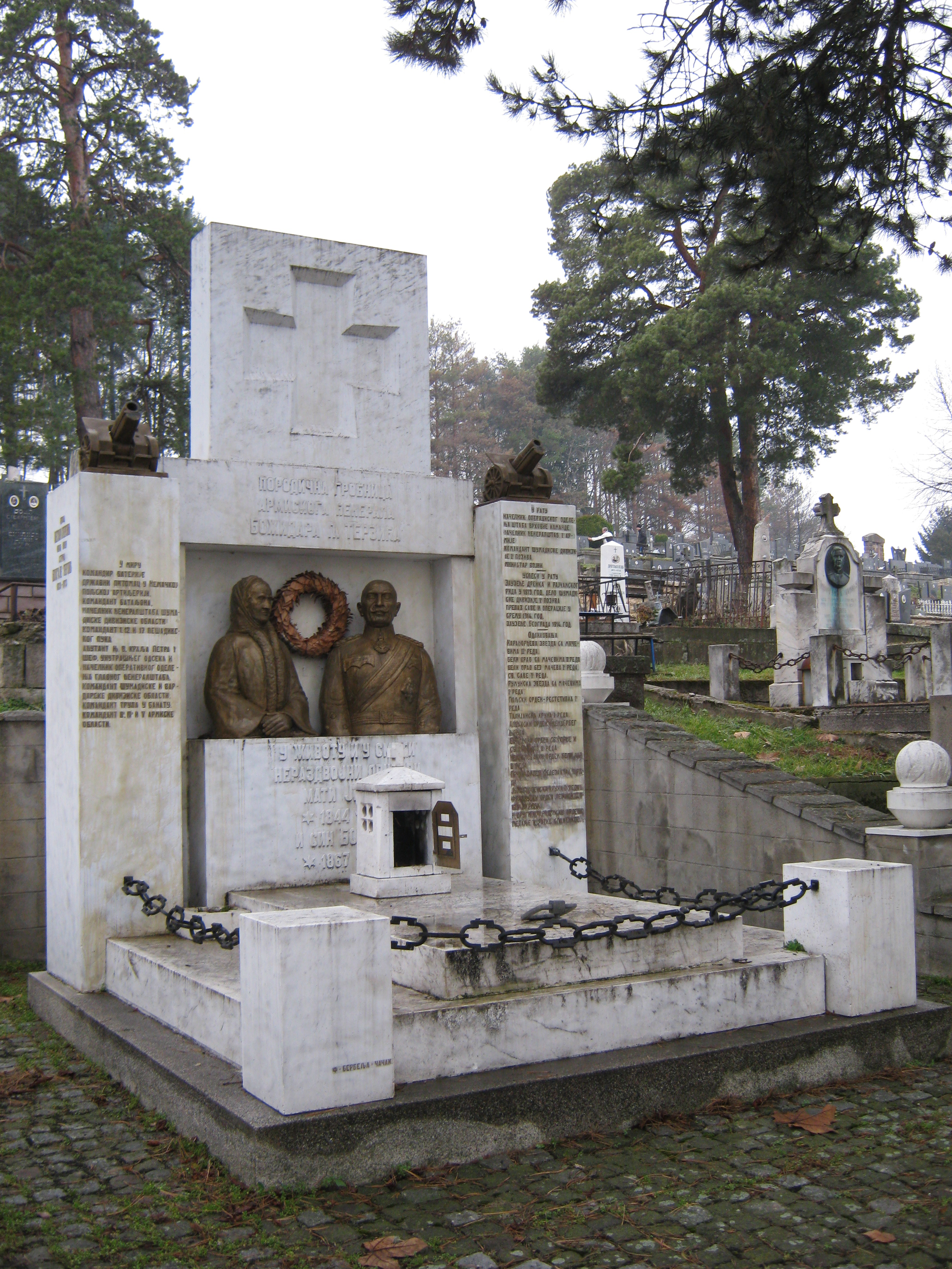 Божидар Терзић (Горњи Милановац, 7. септембар 1867 — Београд, 29. септембар 1939) био је српски генерал и министар војни Краљевине Србије у Првом светском рату. Гробница се налази на градском гробљу у Горњем Милановцу.